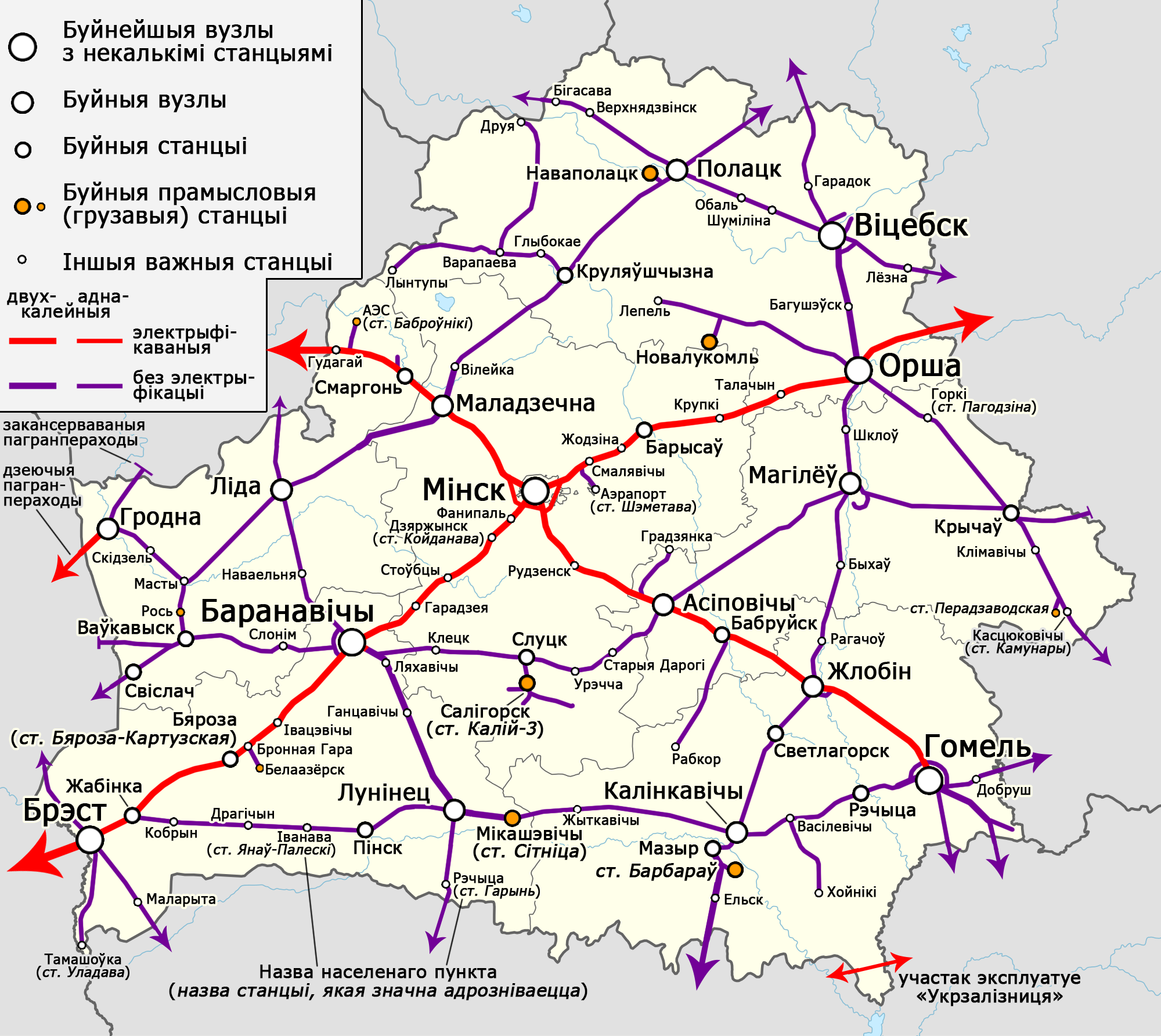 Карта чыгунак Беларусі